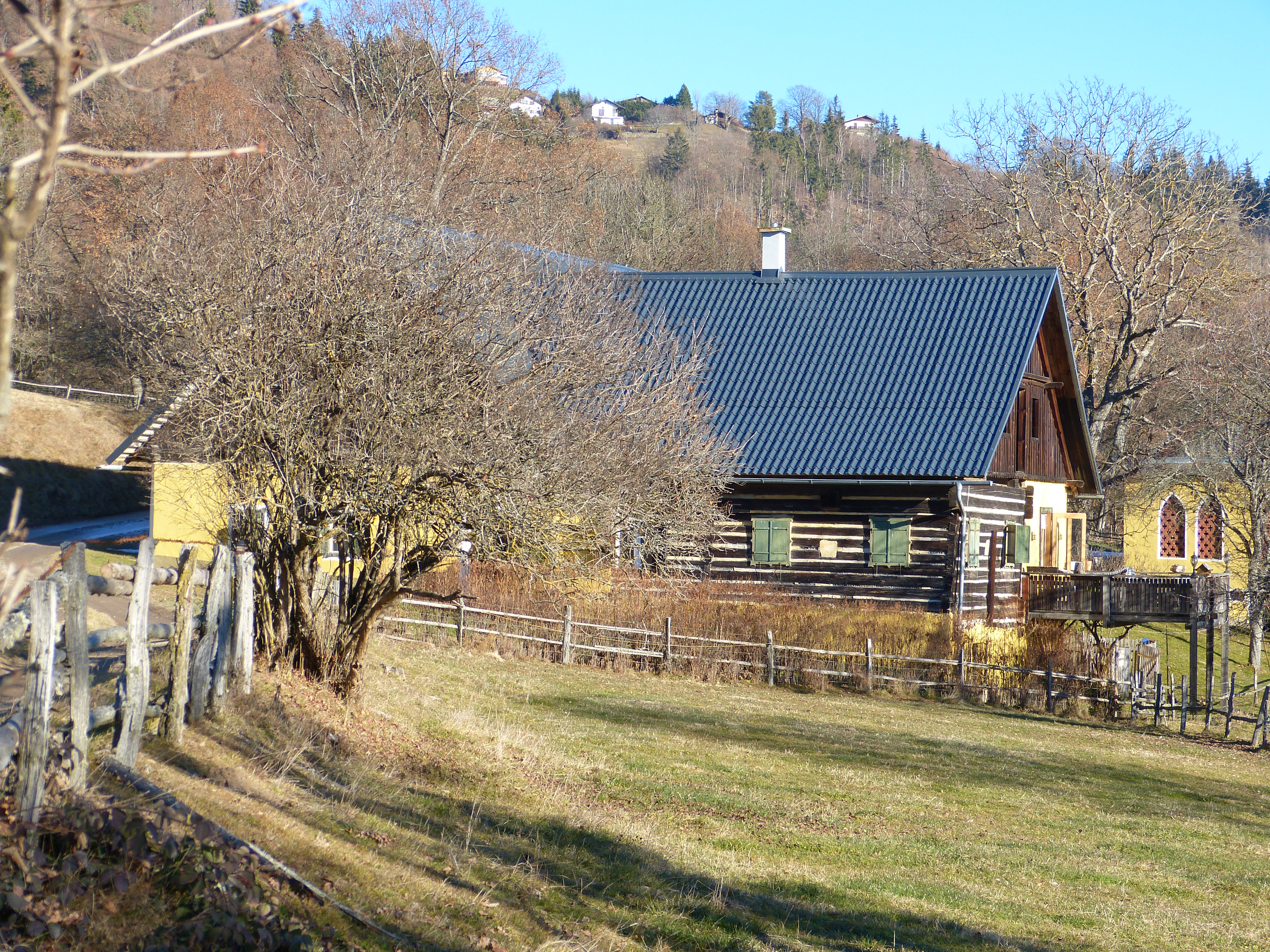 Kulnighof, Christofberg (Gemeinde Brückl, Kärnten): Bauernhaus. Im Dehio Kärnten 2001, S.66, als "für die Ausläufer der Saualpe typisches Winkelhaus" erwähnt; Längslaubenhaus. gut erhaltener Bauernhof; Das Dach wurde 2015 nach einem starken Hagelunwetter renovierte.